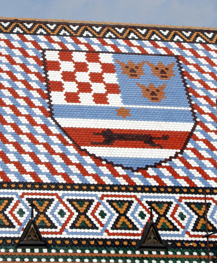 crkva sv. Marka, Zagreb